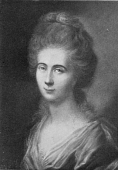 Charlotte Kestner geb. Buff (1753-1828). Pastellgemälde von J. H. Schröder. Tochter des Deutschordens-Amtmanns Buff in Wetzlar. Seit 1768 verlobt mit Johann Georg Christian Kestner (1741-1800), hannoverschem Legationssekretär am Reichskammergericht Wetzlar